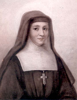 Busto de la santa patrona